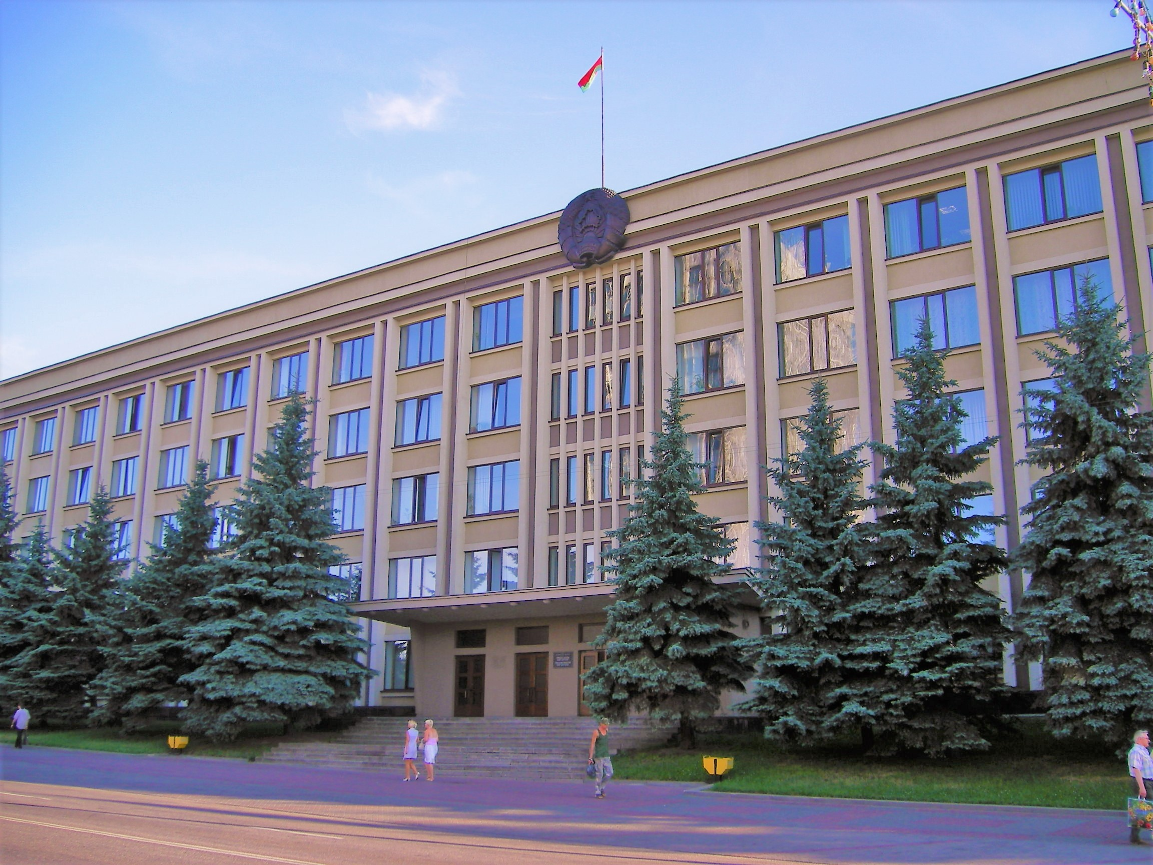 Homel Oblast Administration BuildingГомельский областной исполнительный комитет